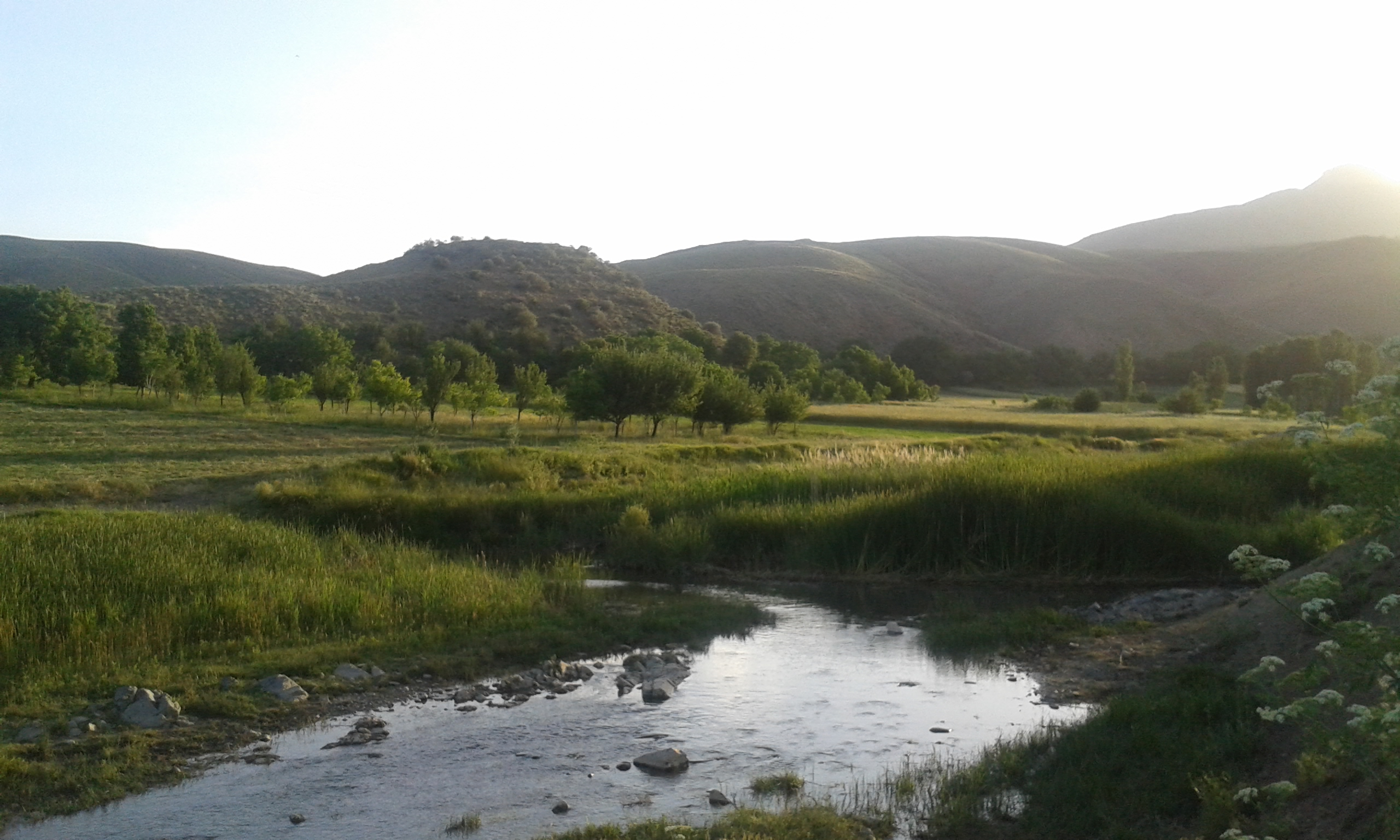 شهرستان شازند - بخش سربند